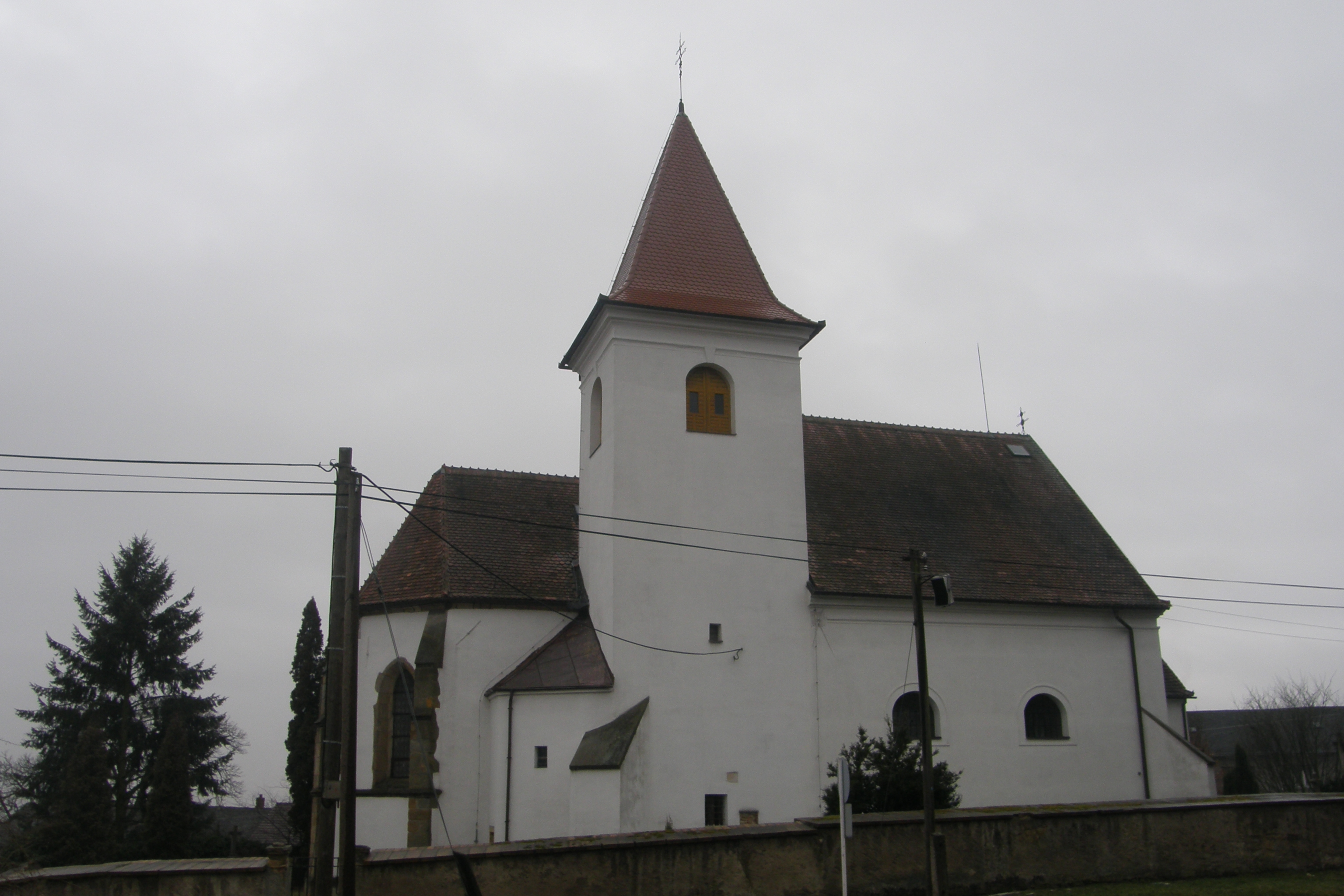 Kostel svatého Václava ve Vanovicích